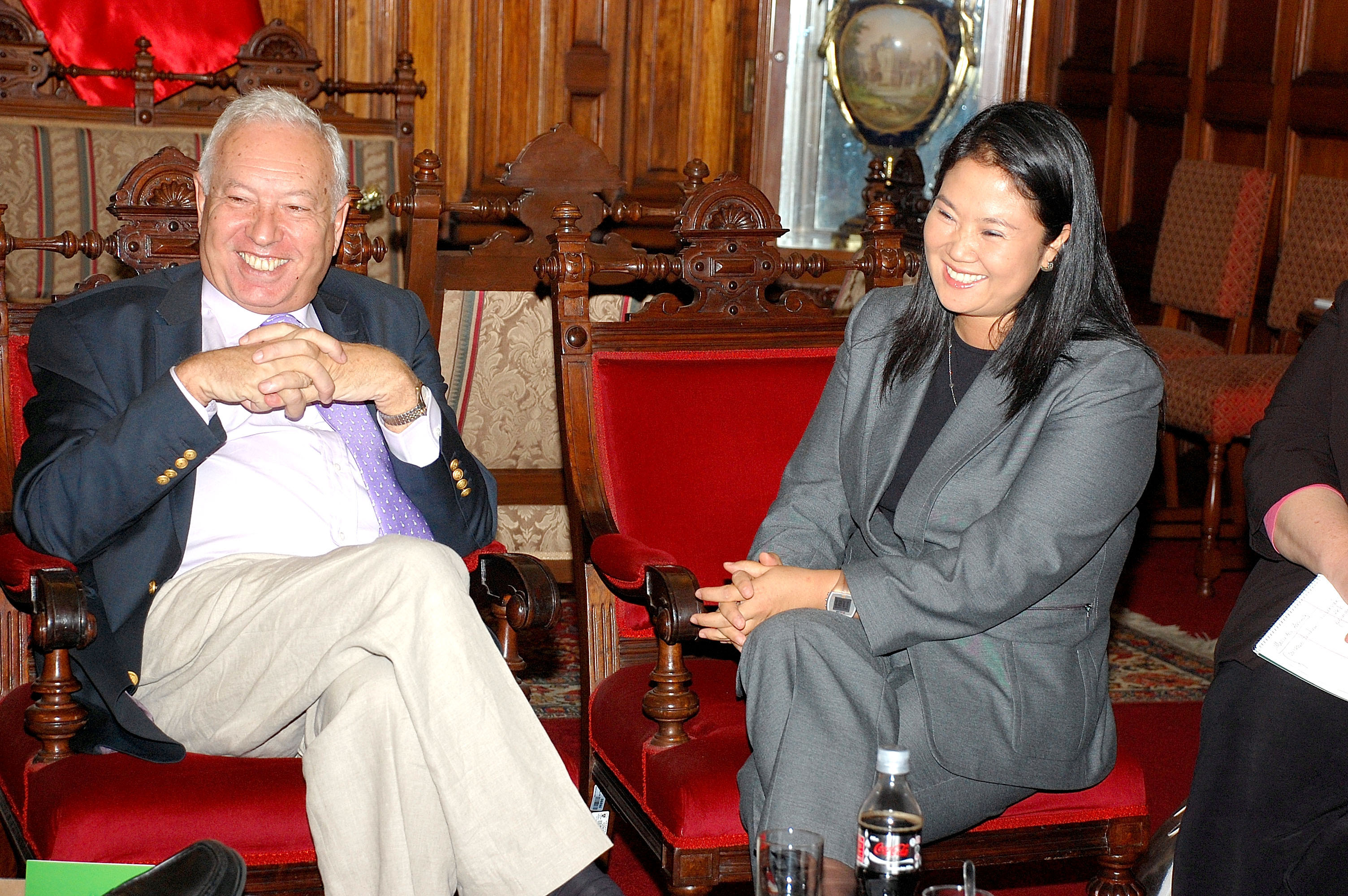 Keiko Fujimori e José Manuel García-Margallo, ministro das relações exteriores da Espanha.